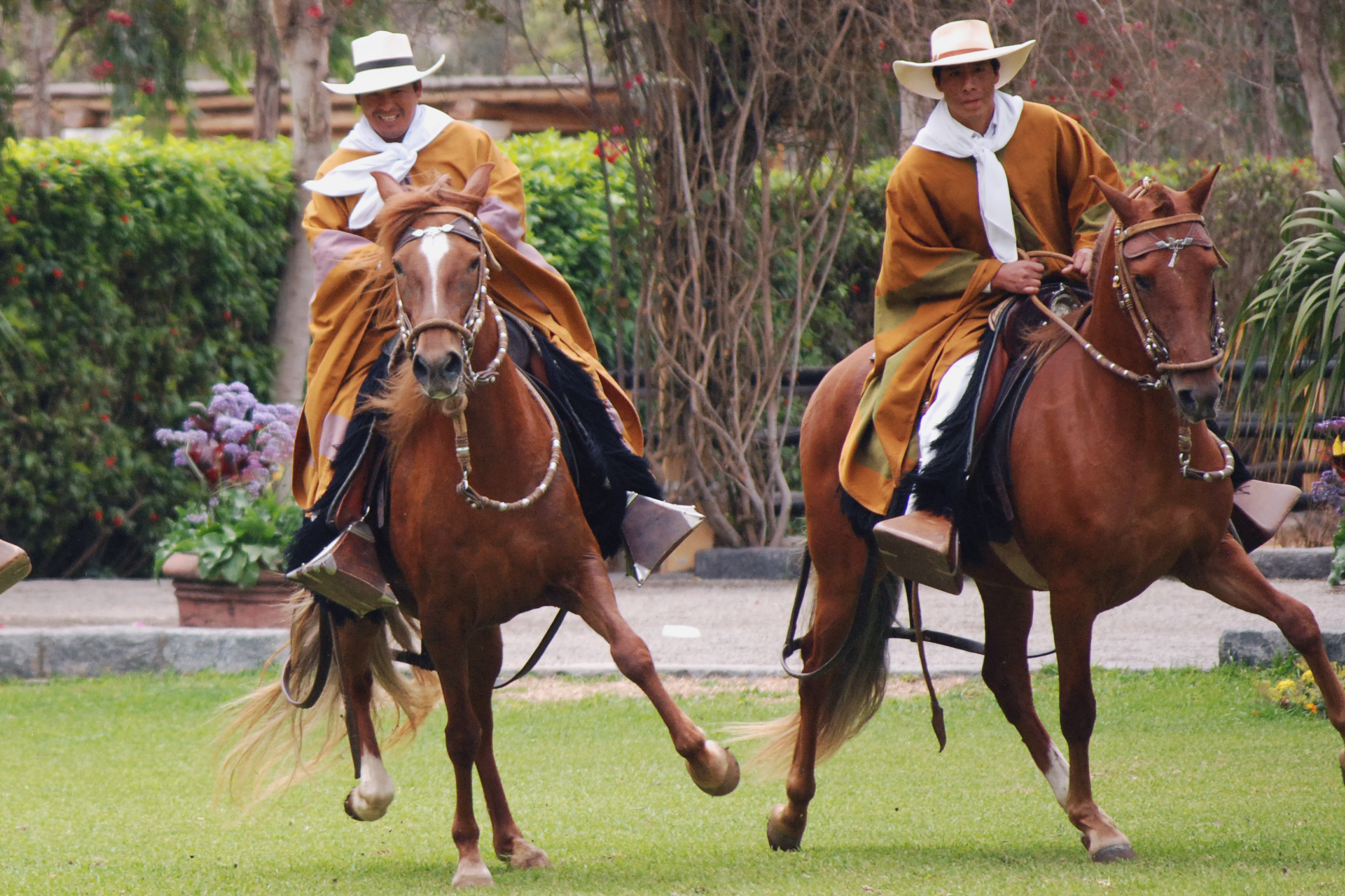 Caballos de Paso de la Hacienda Mamacona